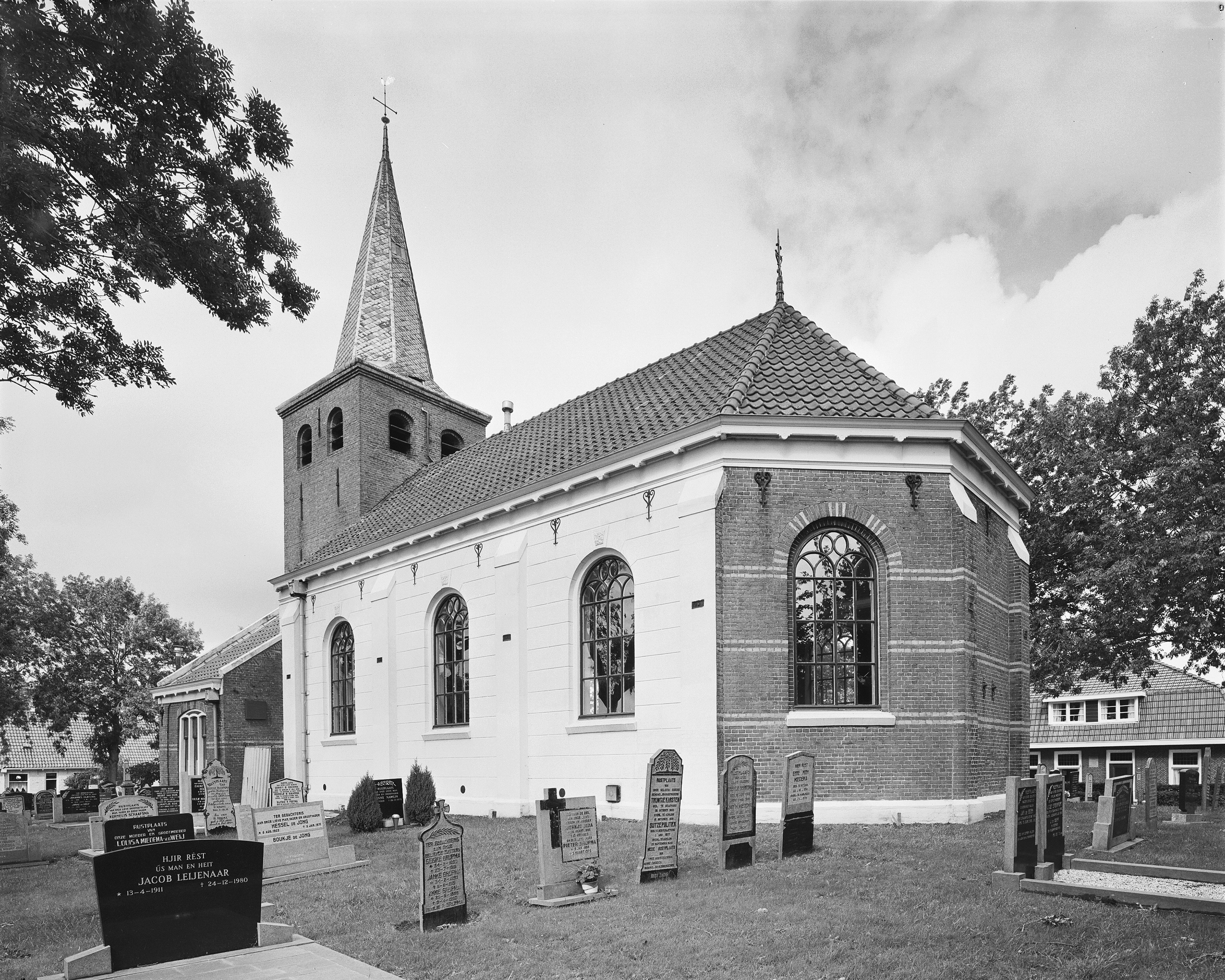 Nederlands Hervormde Kerk: Exterieur ZUIDOOST GEVEL